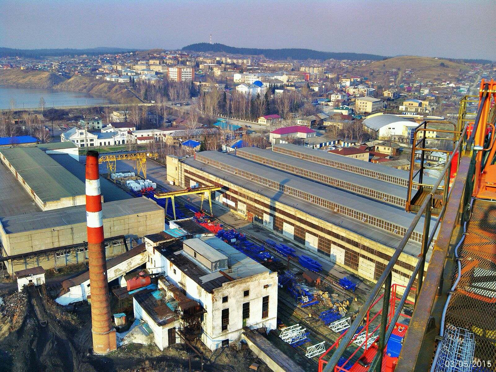 Россия, Челябинская область, город Нязепетровск